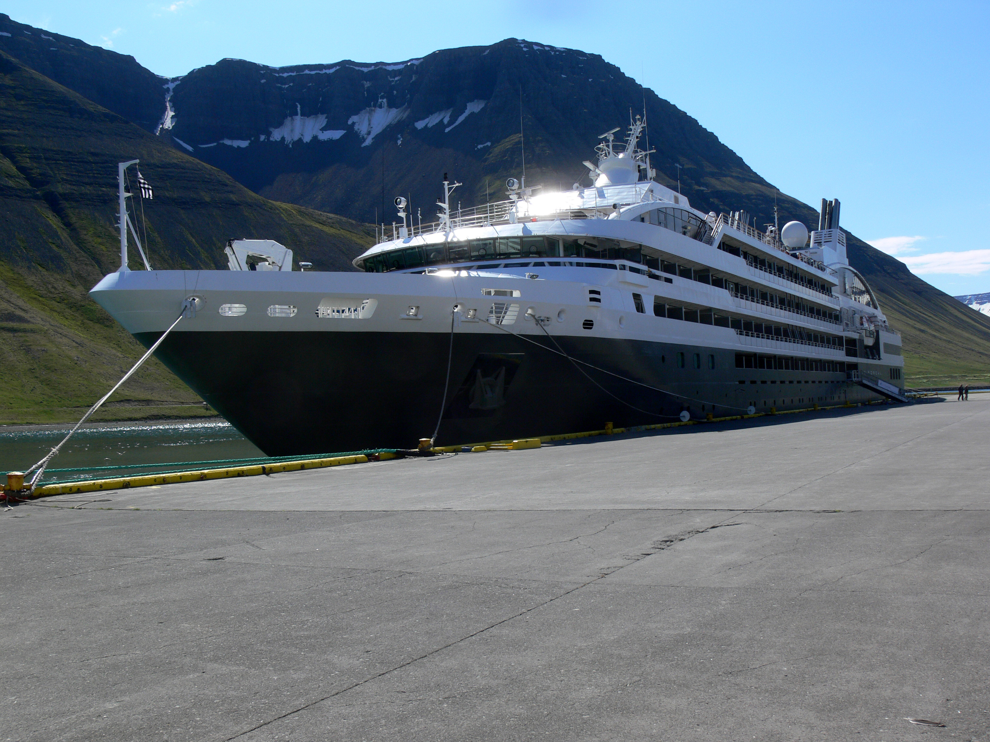 Das Kreuzfahrtschiff «Le Boreal» in Ísafjörður.